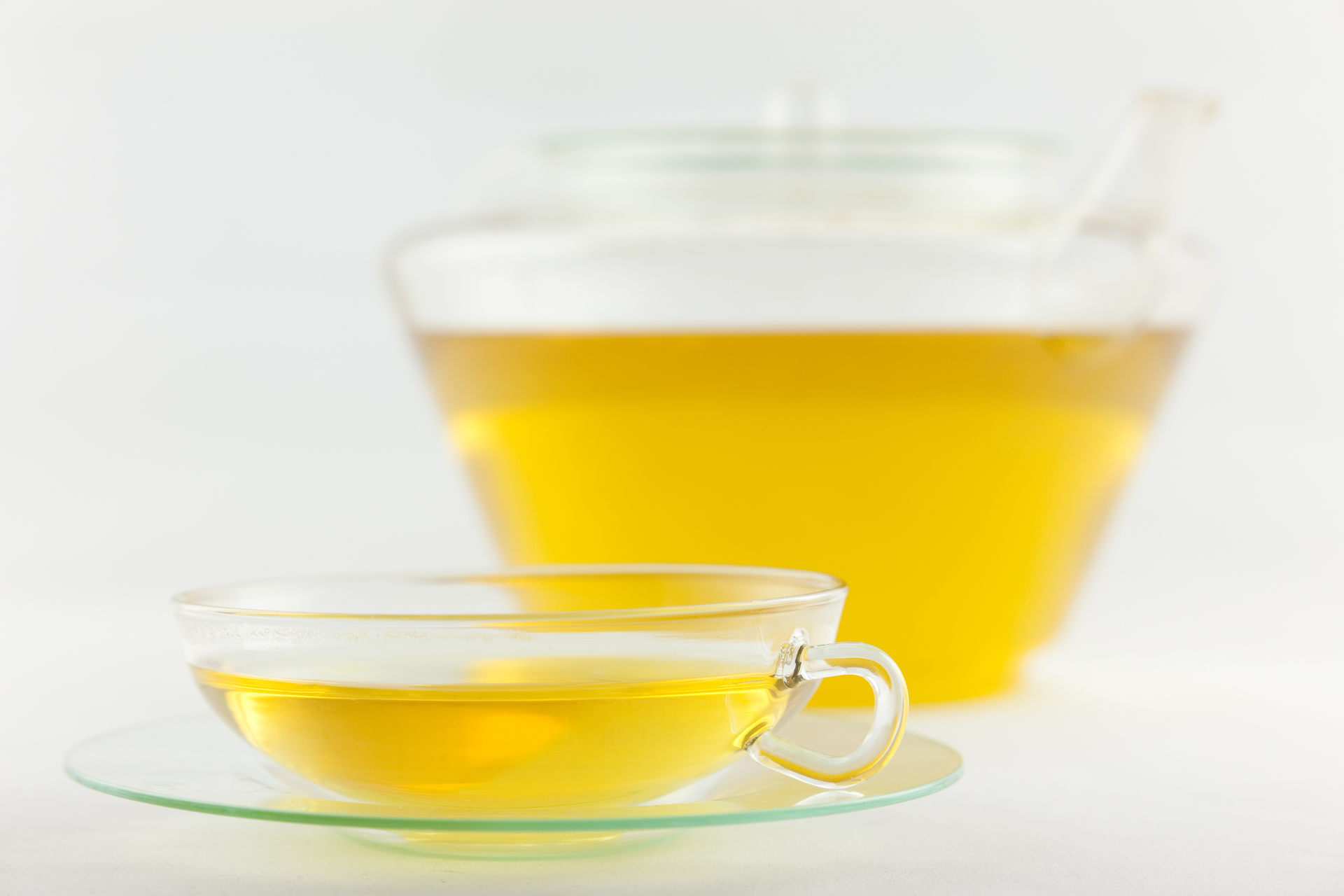 Sencha Japanisch Grüntee frisch aufgebrüht in Wagenfeld Tasse und dazugehoeriger Kanne von Jenaglas